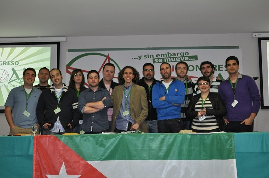 Junta Nacional de Juventudes Andalucistas elegida en el XII Congreso Nacional